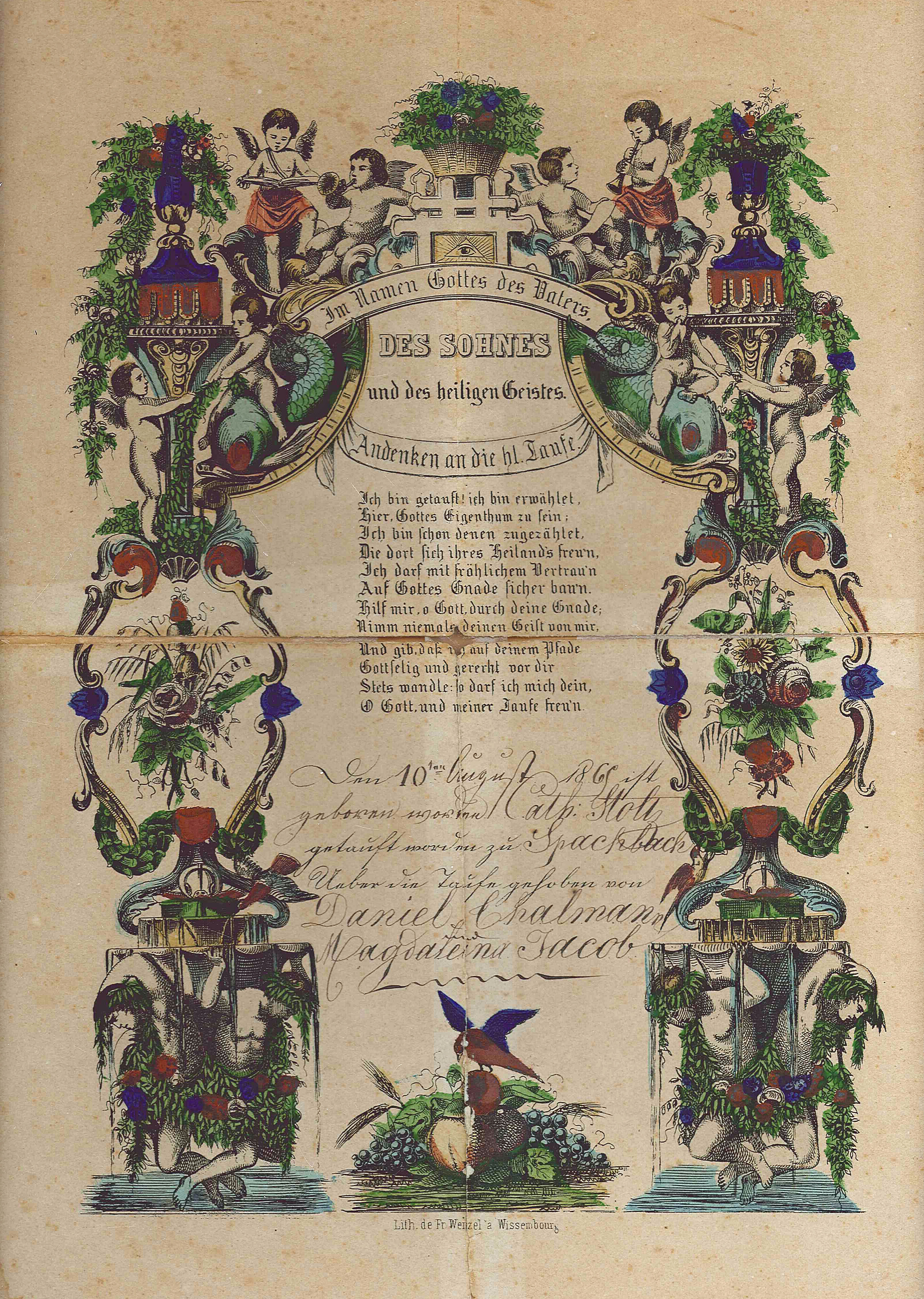 Souhait de baptême protestant alsacien (Goettelbrief) imprimé. Lith. Fr. Wenzel, Wissembourg. Spachbach, 1865. Collection particulière.